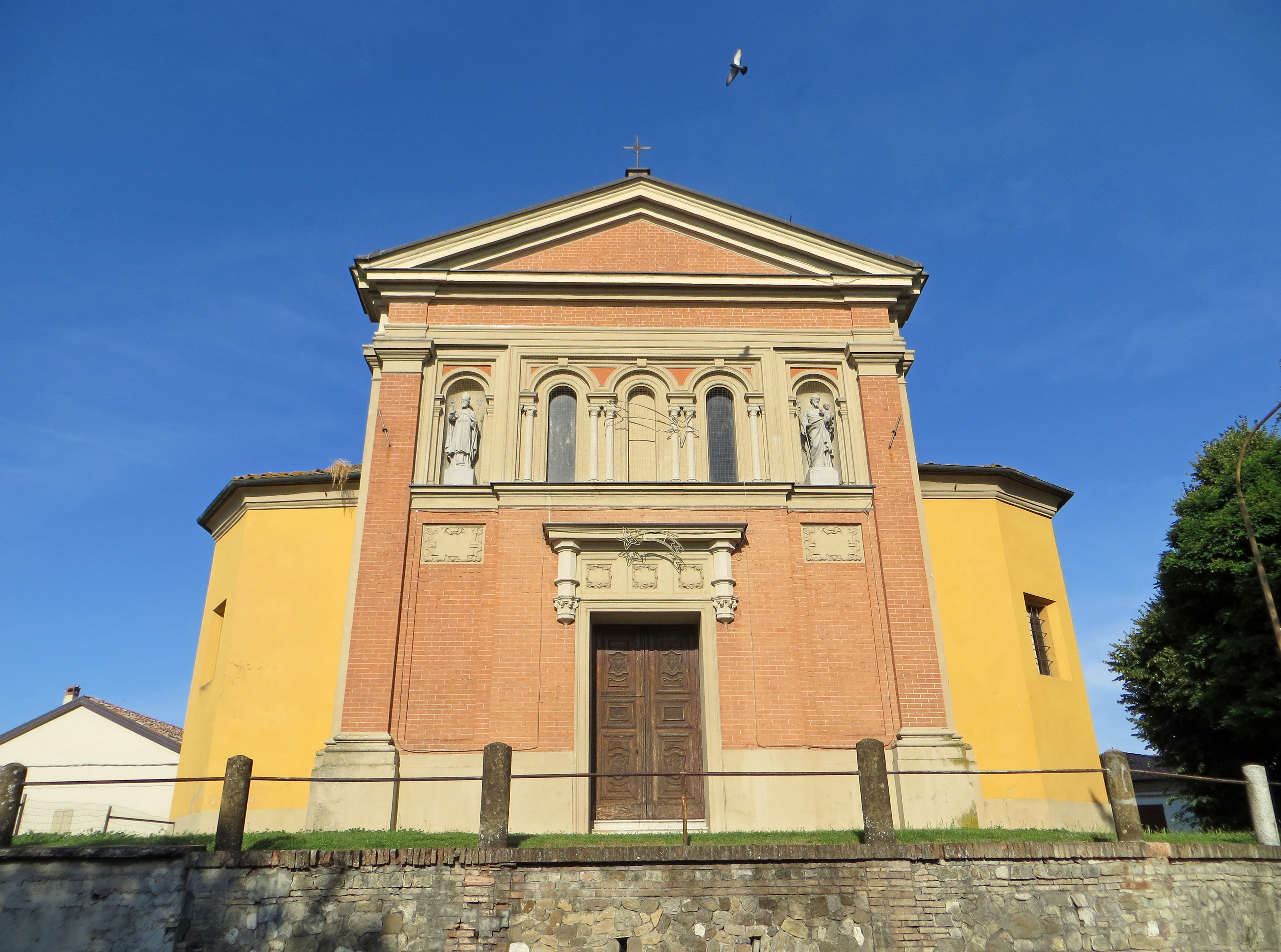 Chiesa di Santo Stefano (Basilicagoiano, Montechiarugolo) - facciata